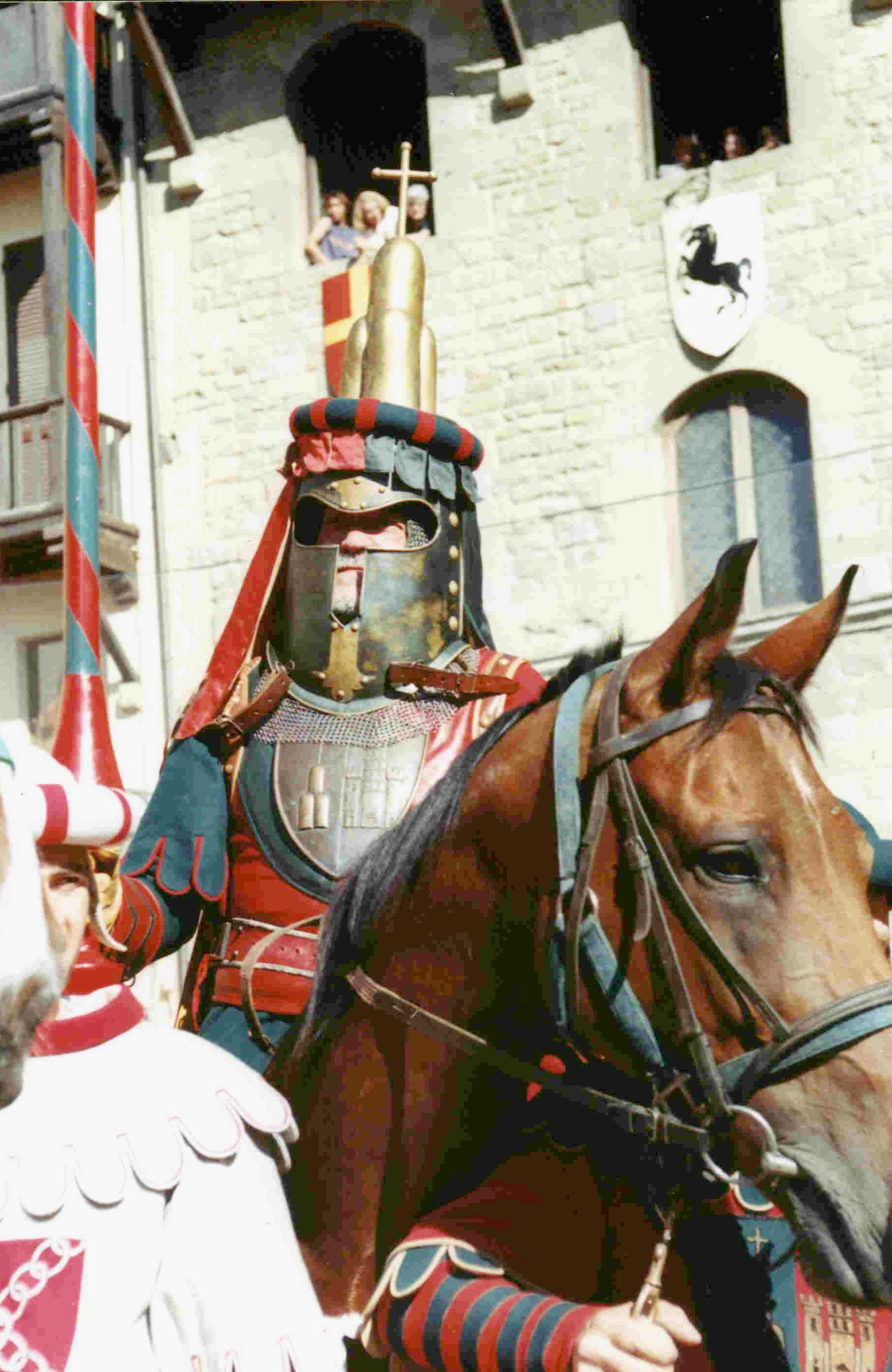 Il Capitano del Quartiere di Porta Crucifera, alla Giostra del Saracino ad Arezzo.